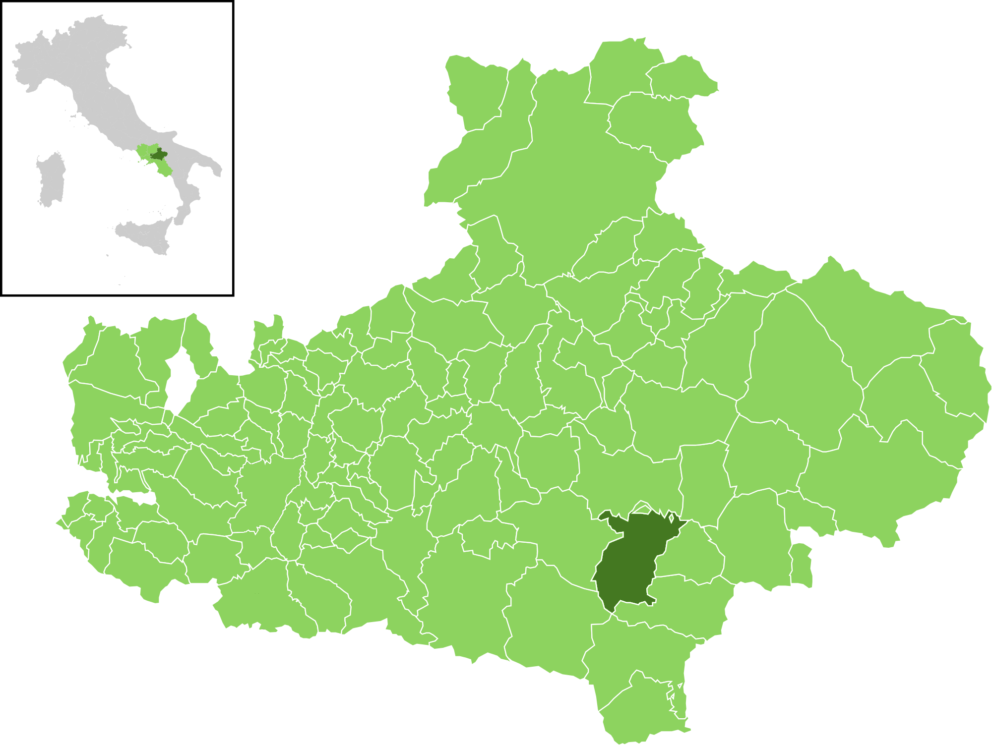 Il comune all'interno della provincia di Avellino